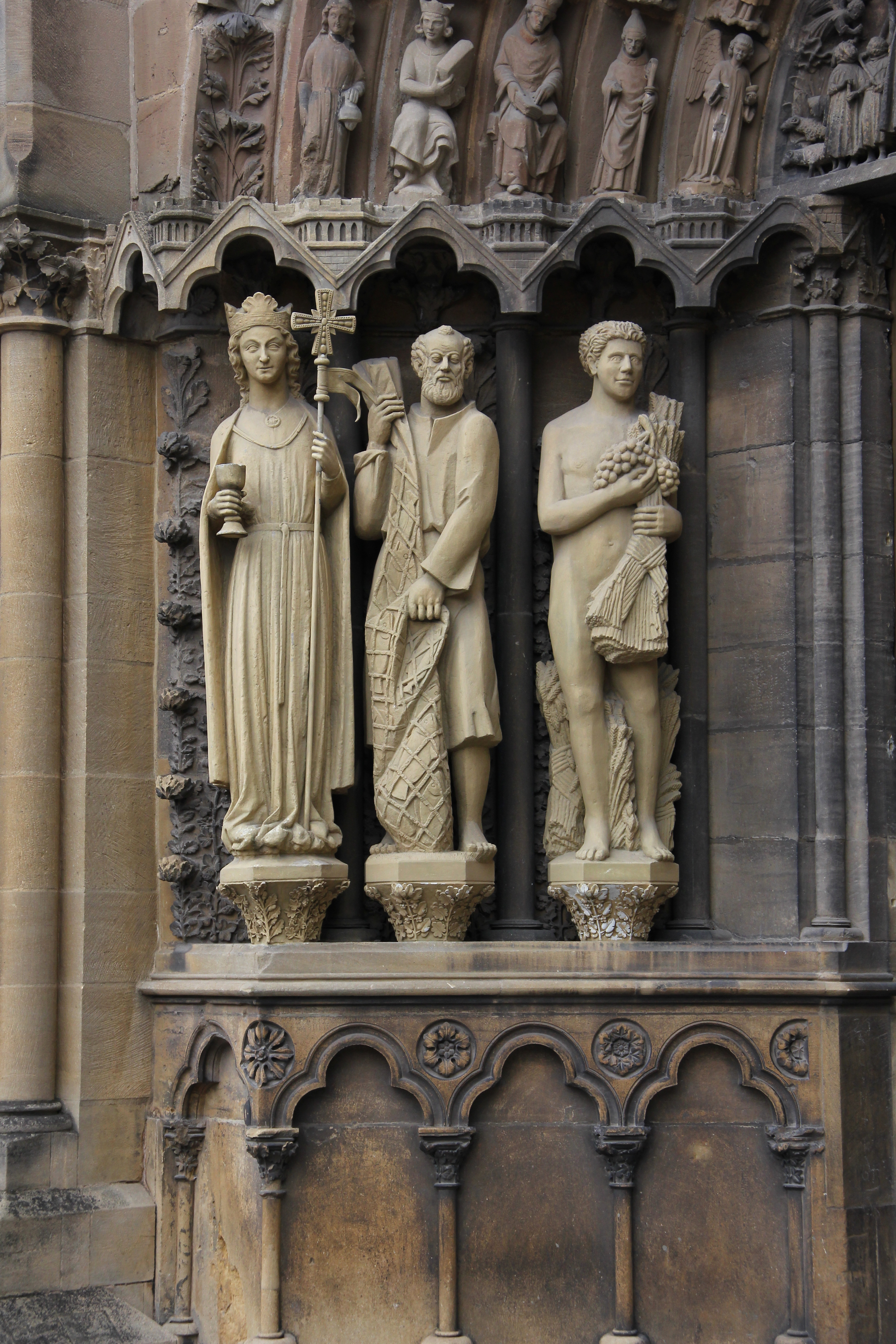 Westportal der Liebfrauenkirche in Trier: Ecclesia als Symbol des christlichen Evangeliums, Petrus mit dem Fischernetz (statt der üblichen Schlüssel) und Adam. Die Statue der Ecclesia ist ein Abguss des im Museum befindlichen Originals. Die beiden anderen Figuren waren im Zuge der Säkularisation zu Beginn des 19. Jahrhunderts verloren gegangen. Die jetzigen Statuen sind 1991/92 geschaffene Neuschöpfungen der Bildhauer Theo Heiermann (Petrus) und Elmar Hillebrand (Adam). Die Figuren sind etwa 1,80 Meter groß.